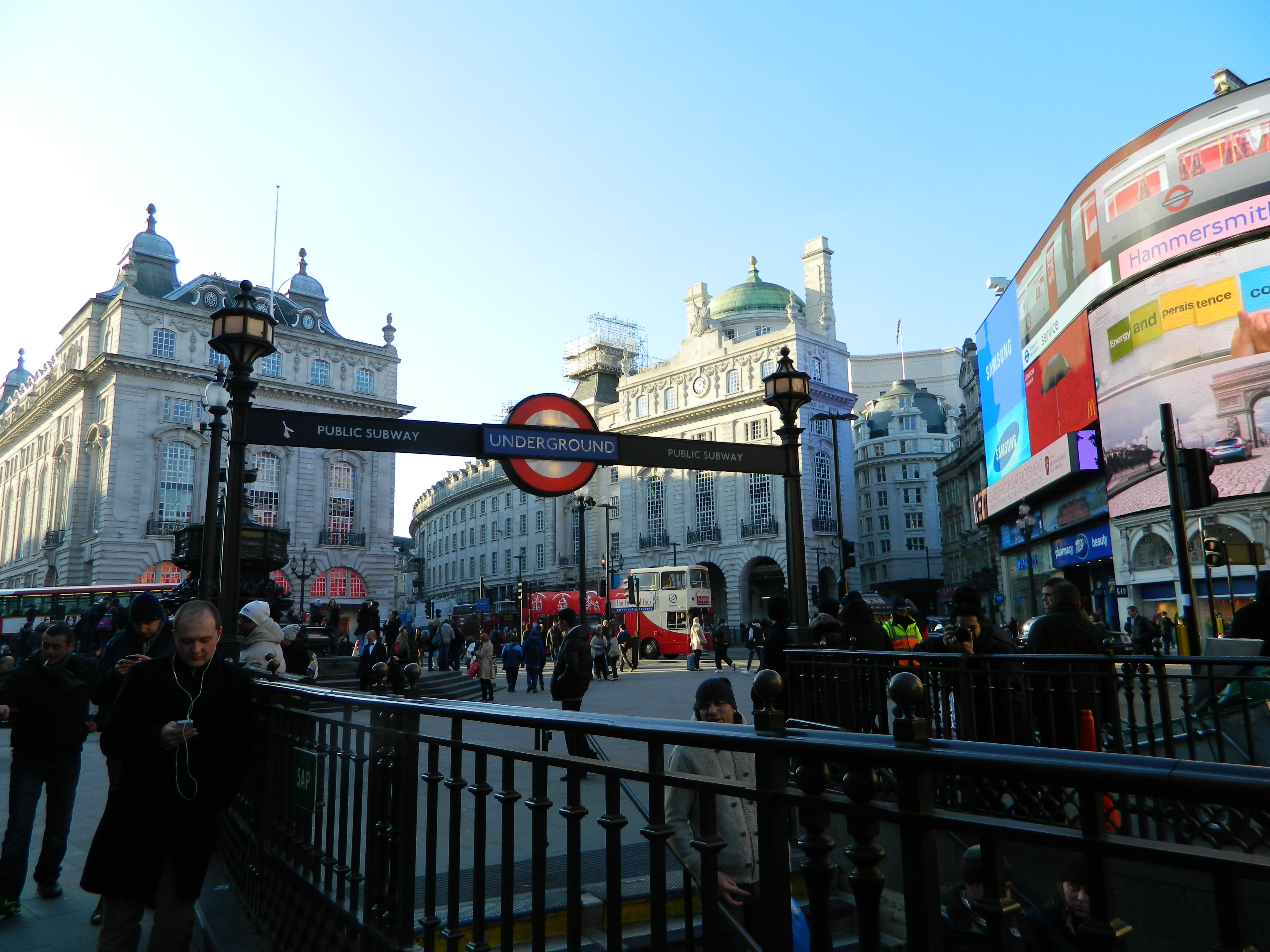 London